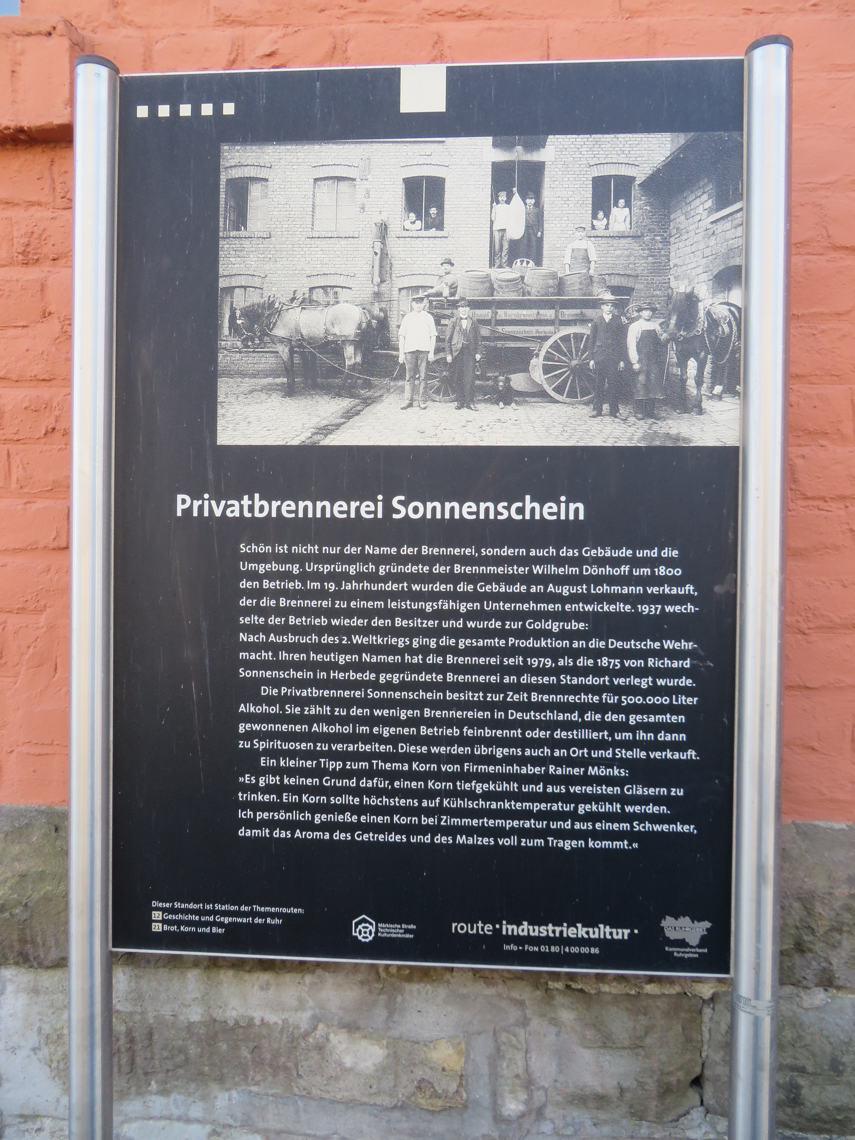 Privatbrennerei Sonnenschein, Infotafel Route der Insustriekultur in Witten